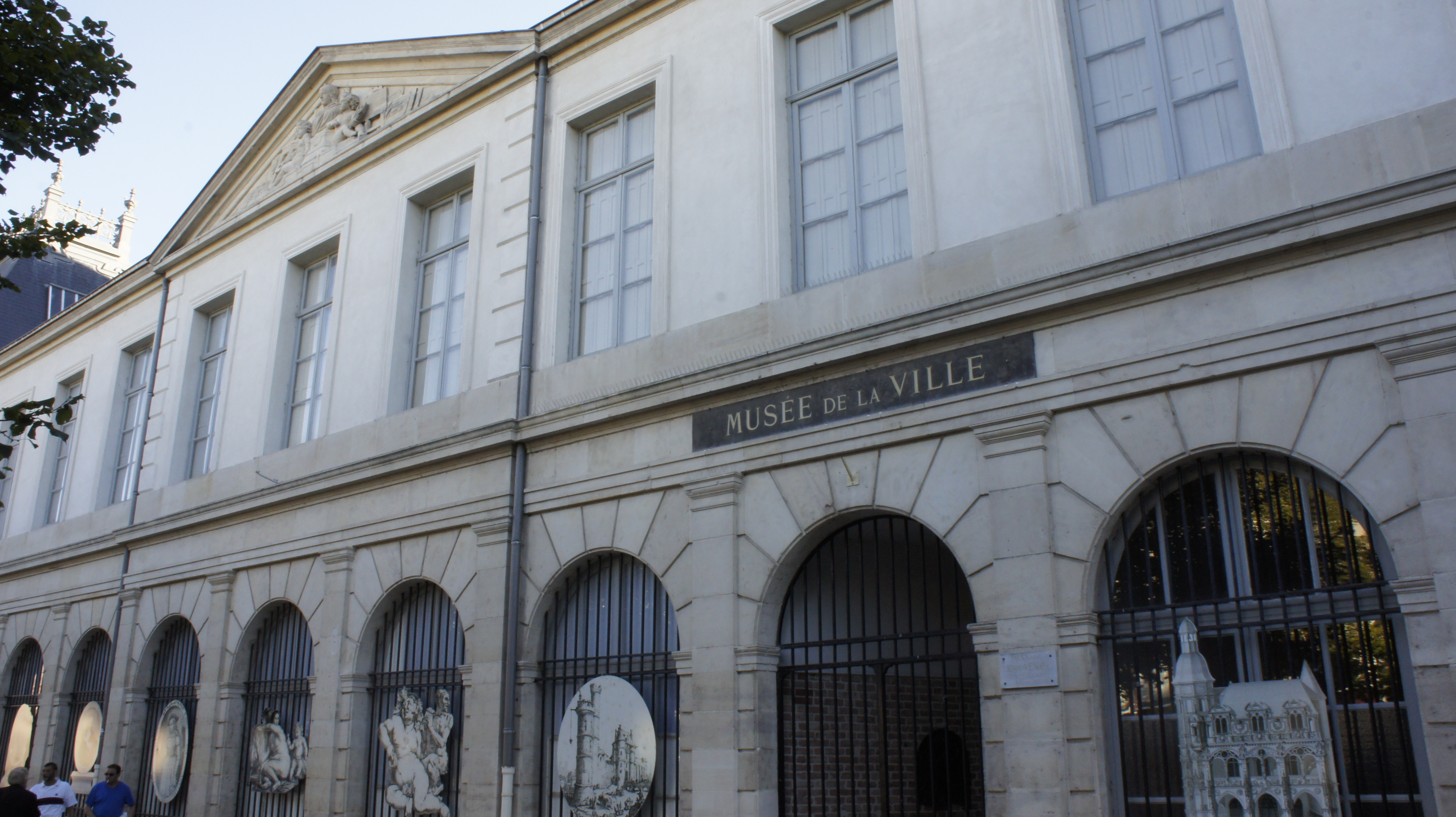 Façade du Musée_Chaalons_.